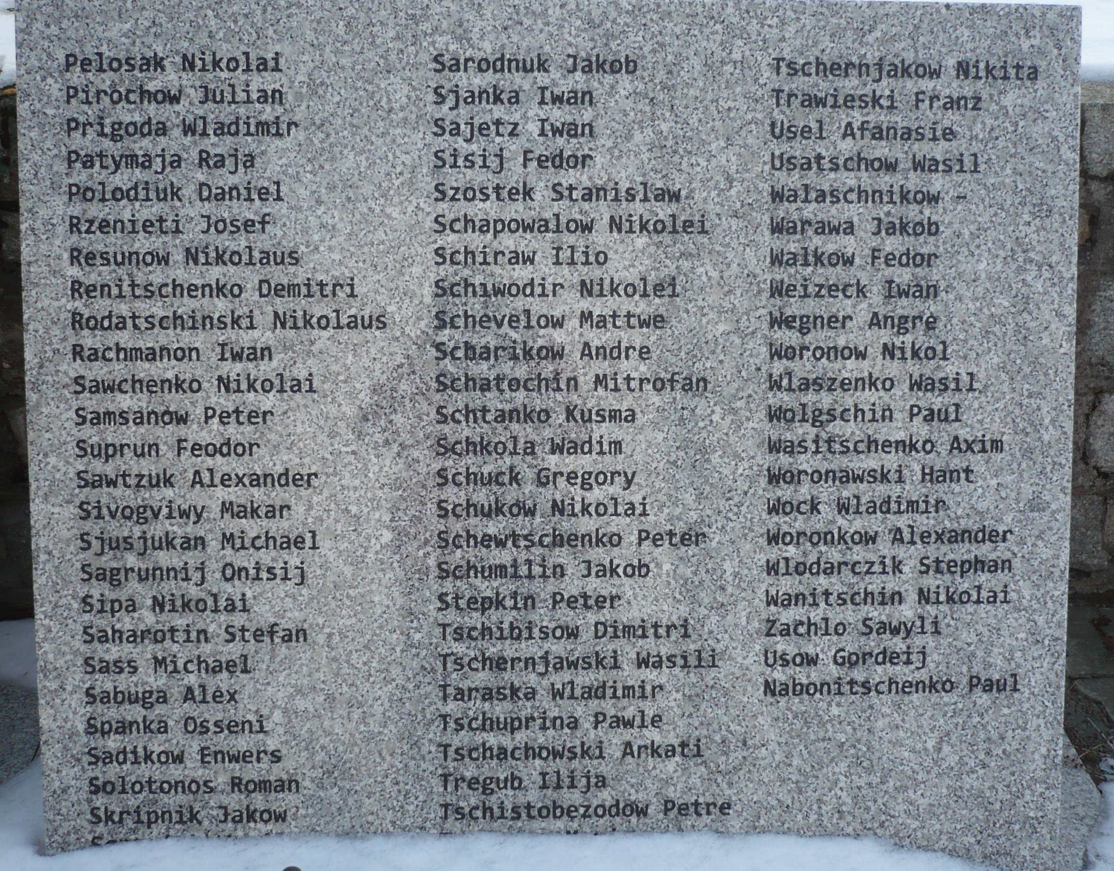 Walim. Cmentarz